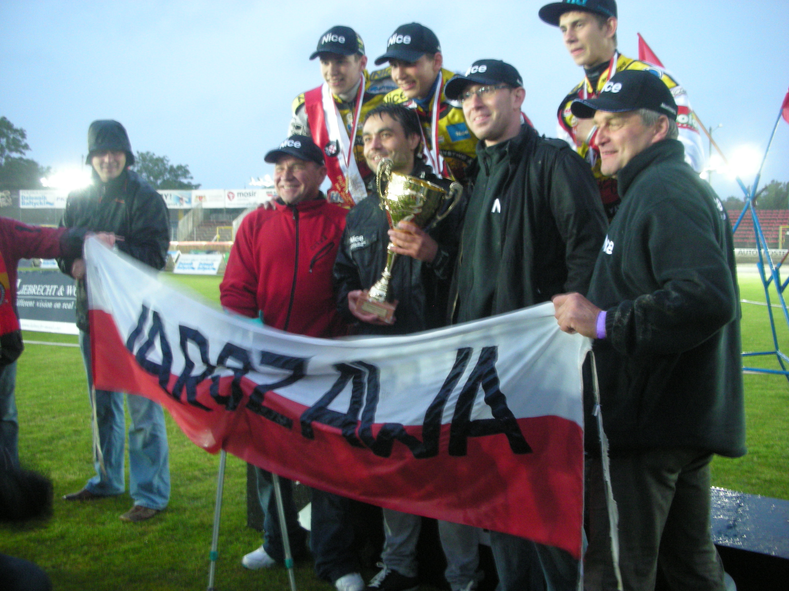 WTS Warszawa na podium MMPPK (Młodzieżowe mistrzostwa Polski par klubowych na żużlu) w Gdańsku 2011, Stadion im. Zbigniewa Podleckiego.